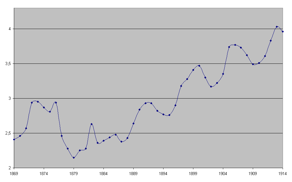 Löhne im Sauerländer Bergbau (Ramsbeck) 1869-1914